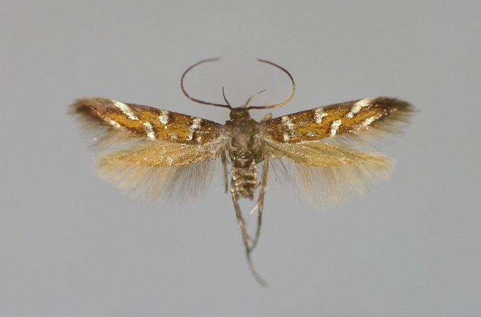 Pancalia schwarzella, Männchen